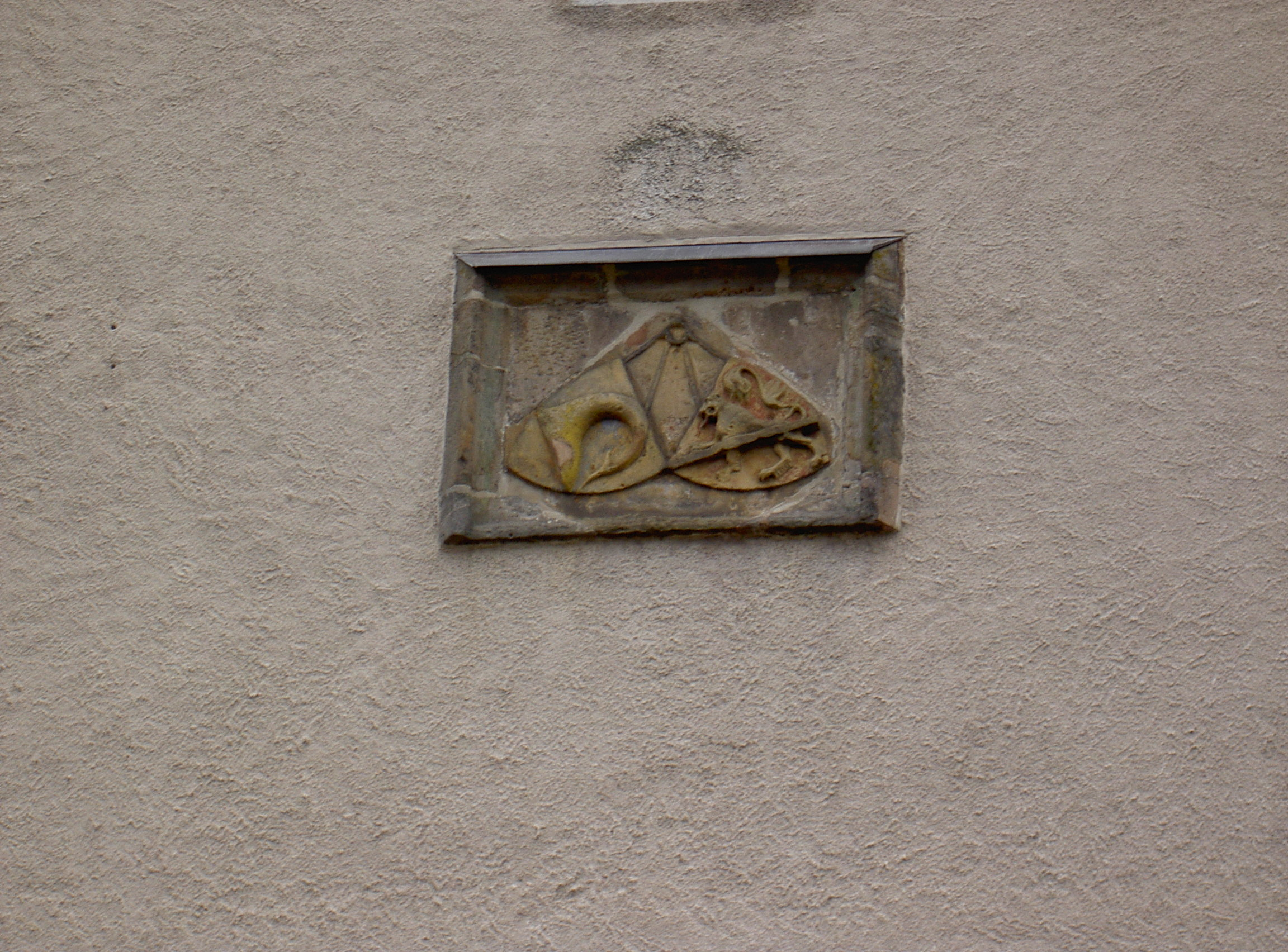 Vilstor in Vilseck